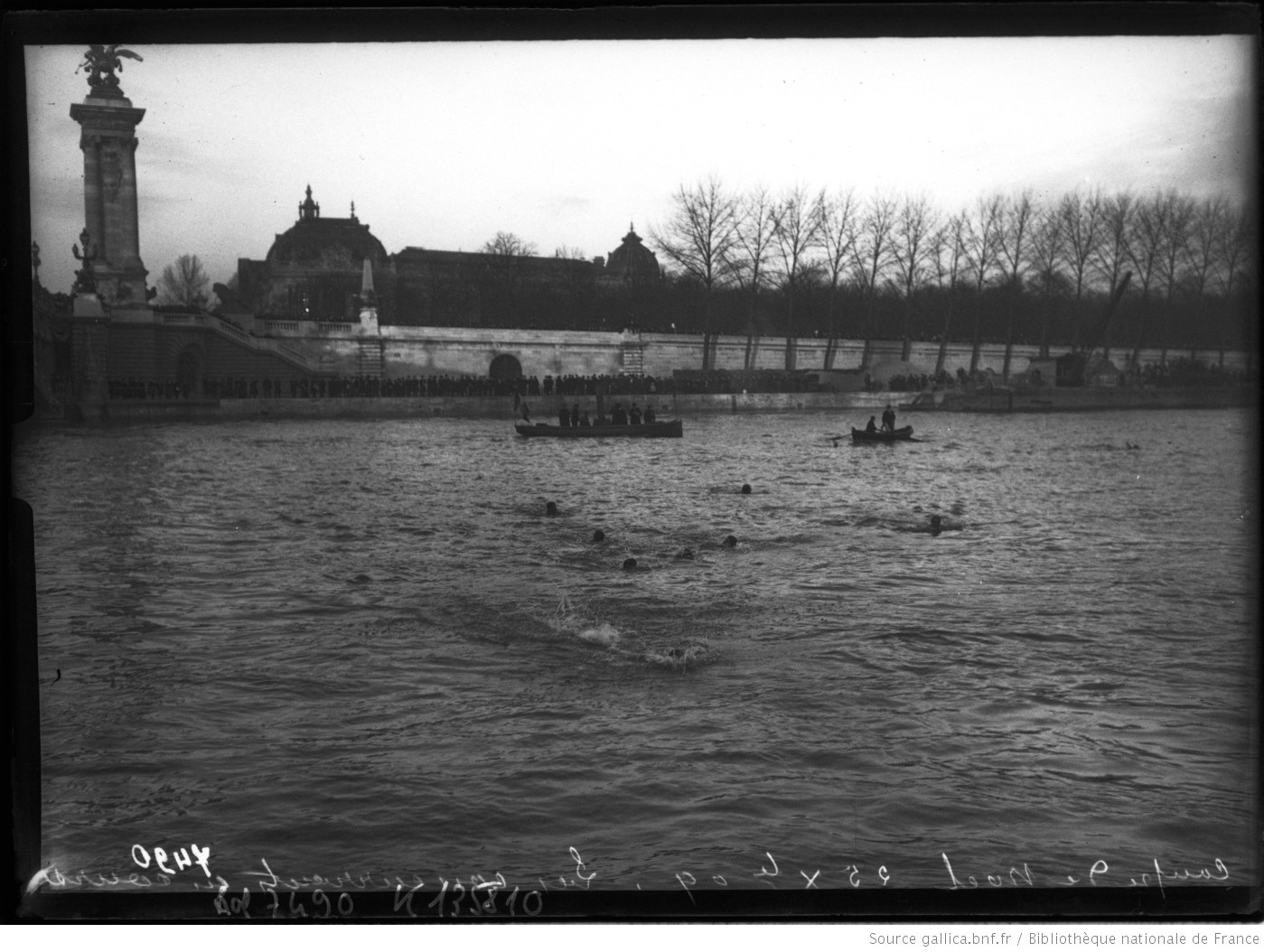 Coupe de Noël à Paris : les nageurs traversant la Seine durant cette compétition de natation le 25 décembre 1909.